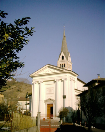 Chiesa di Strigno (provincia di Trento)